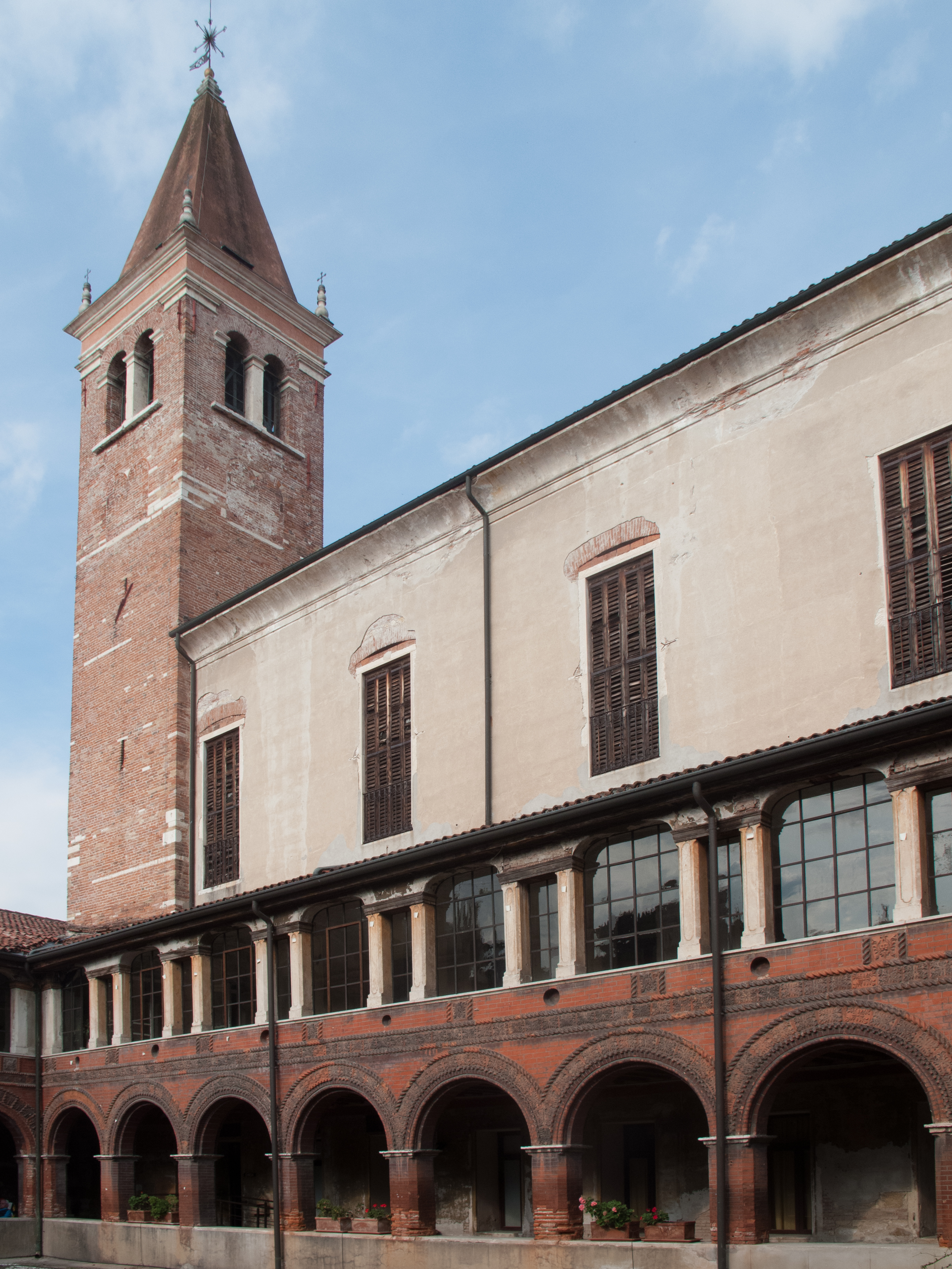 Chiostro